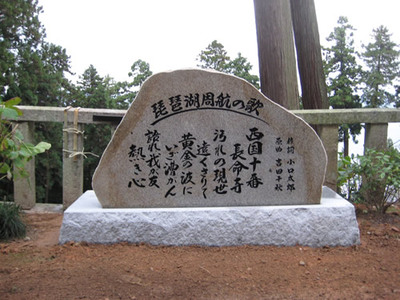 長命寺に建立した歌碑（琵琶湖周航の歌6番）